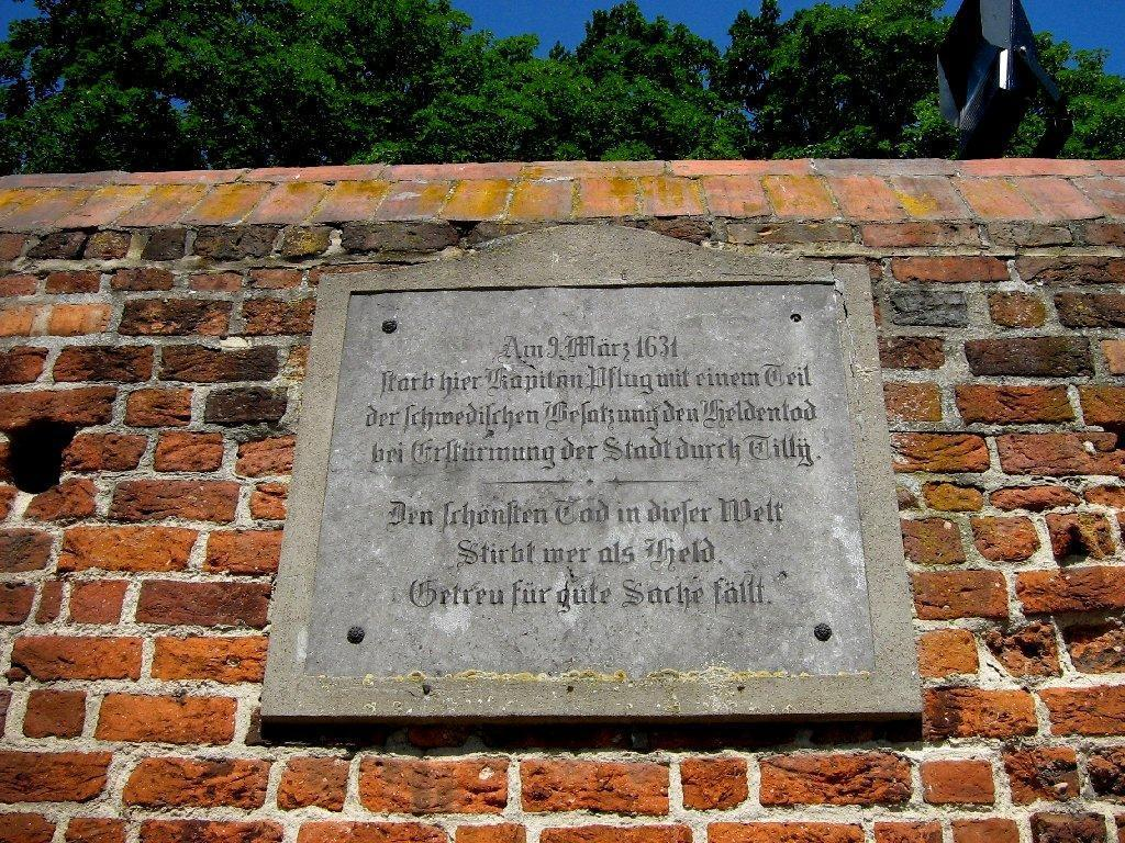 Gedenktafel innerhalb der Doppeltoranlage des Friedländer Tores in Neubrandenburg. Im 30-jährigen Krieg, 1631, gelang es den Truppen des Generals Tilly in die Mauer neben dem Tor eine Bresche zu schießen und in die Stadt einzudringen. Text auf der Tafel: Am 9.März 1631 starb hier Kapitän Pflug mit einem Teil der schwedischen Besatzung den Heldentot bei der Erstürmung der Stadt durch Tilly....